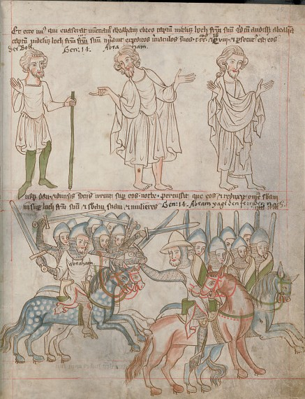 Abraham se dovídá o Lotově zajetí